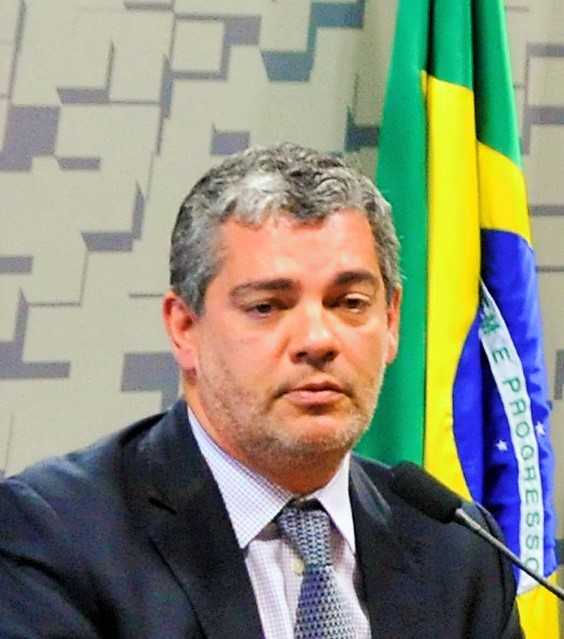 Marcos Troyjo numa CRE - Comissão de Relações Exteriores e Defesa Nacional do Congresso Nacional do Brasil.